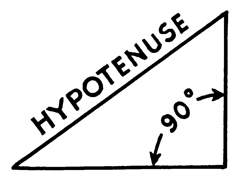 Hypotenuse